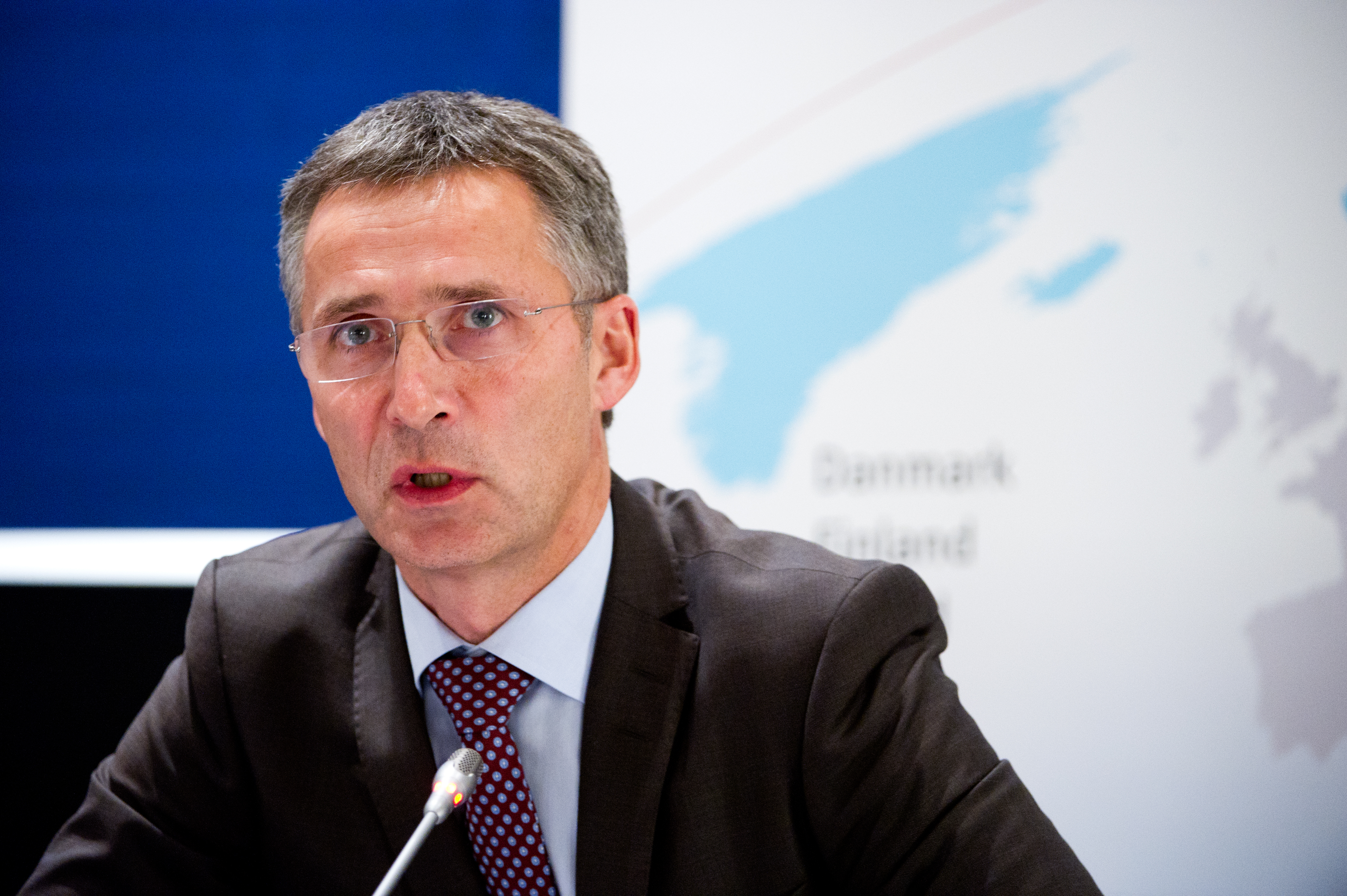 Norges statsminister Jens Stoltenberg på Nordiska rådets session 2011 i Köpenhamn